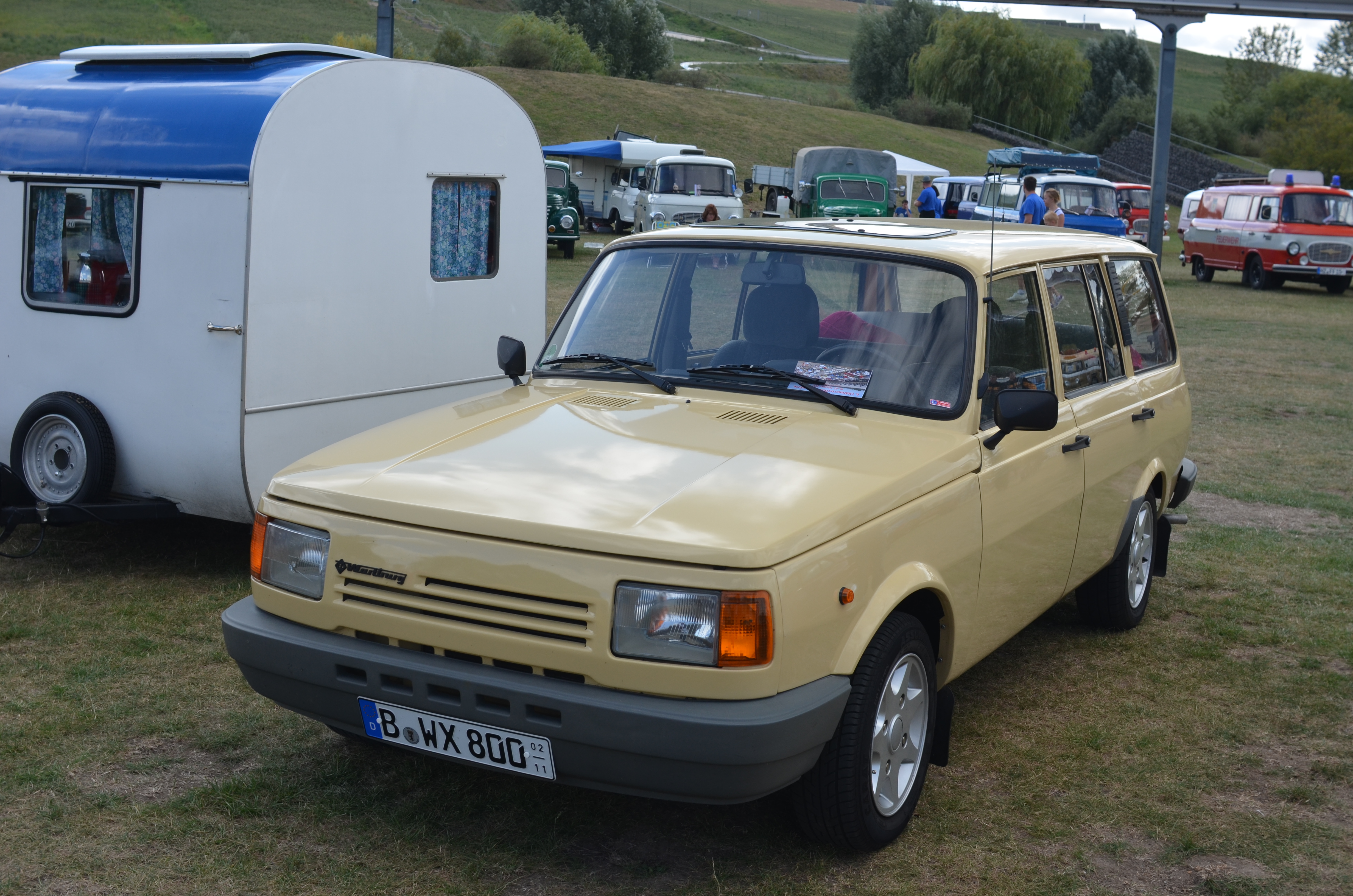 Wartburg